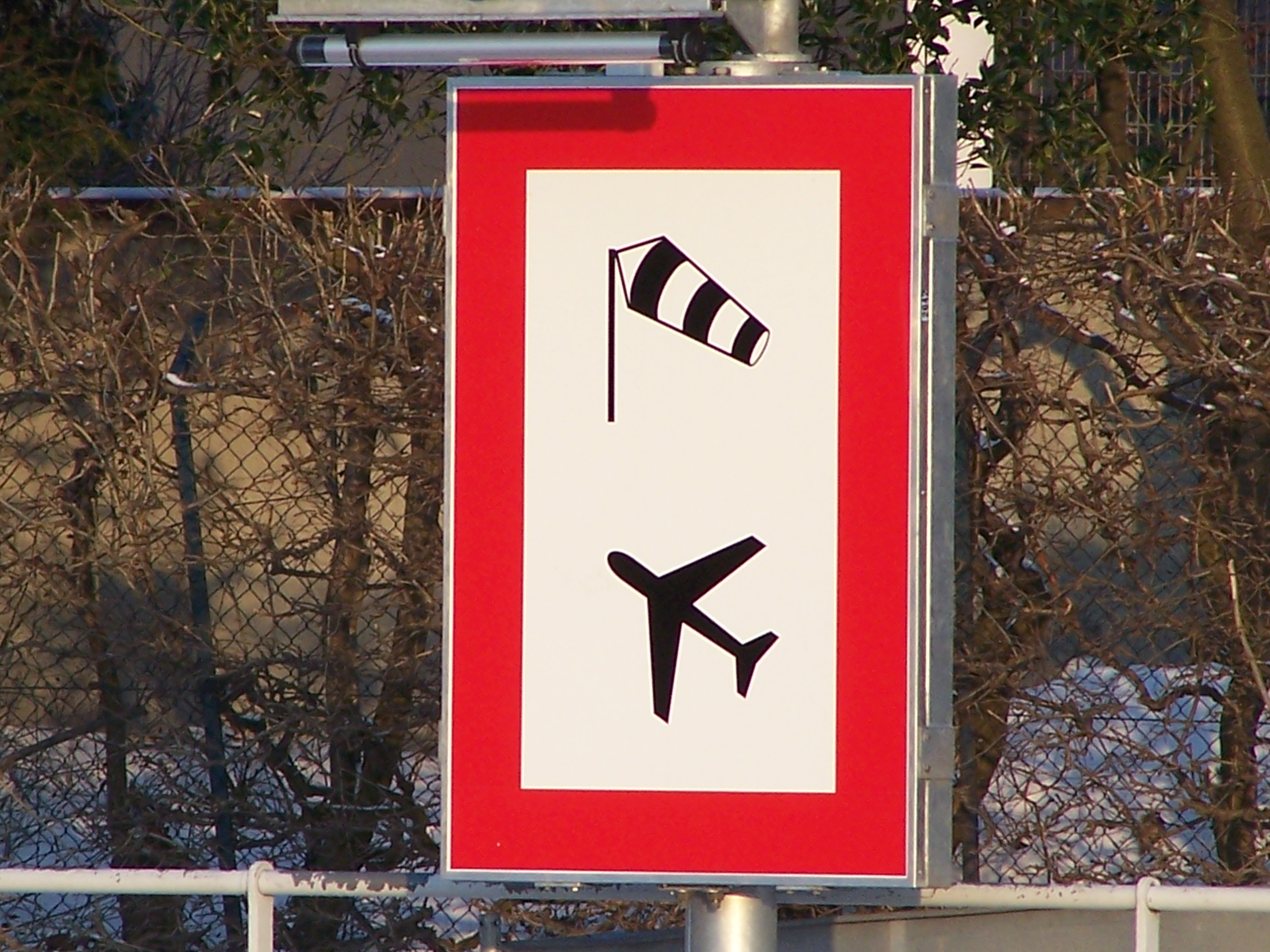 Hinweisschild für Segler am Yachthafen Teufelsbrück